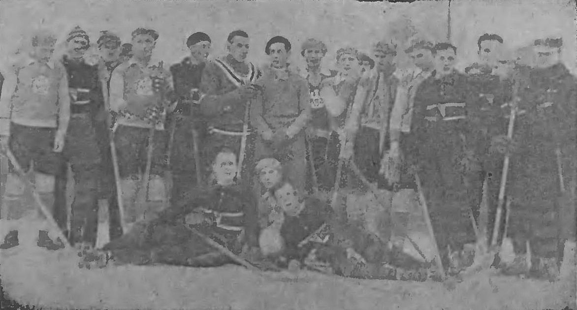 Hokeiści Legii Warszawa i AZS Wilno przed meczem w turnieju mistrzostw Polski 1928/1929 rozgrywanym w Krynicy-Zdroju (29 grudnia 1928).